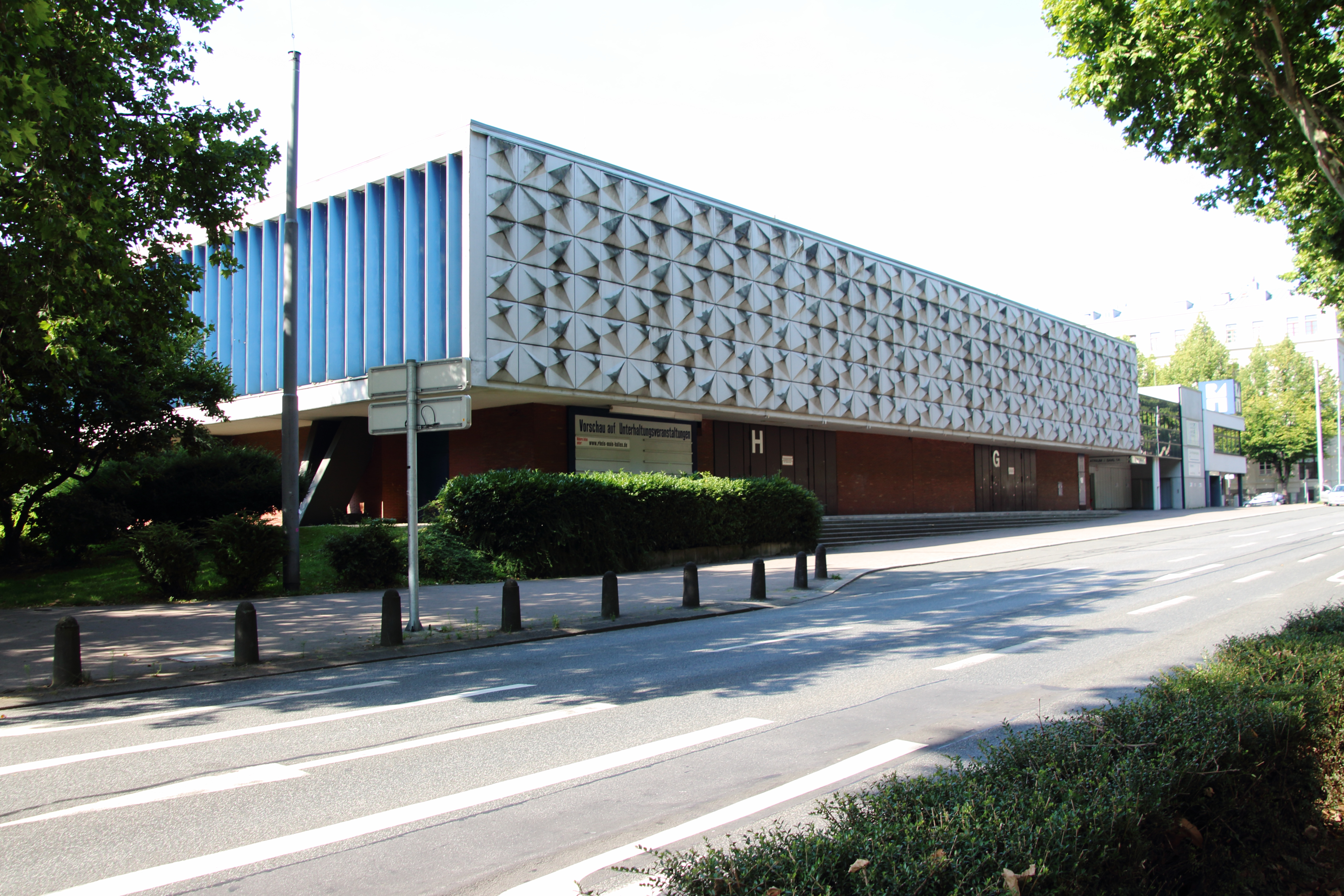 Rhein-Main-Hallen, erbaut 1957, Abriss 2014. Blick von der Rheinstrasse. Wiesbaden